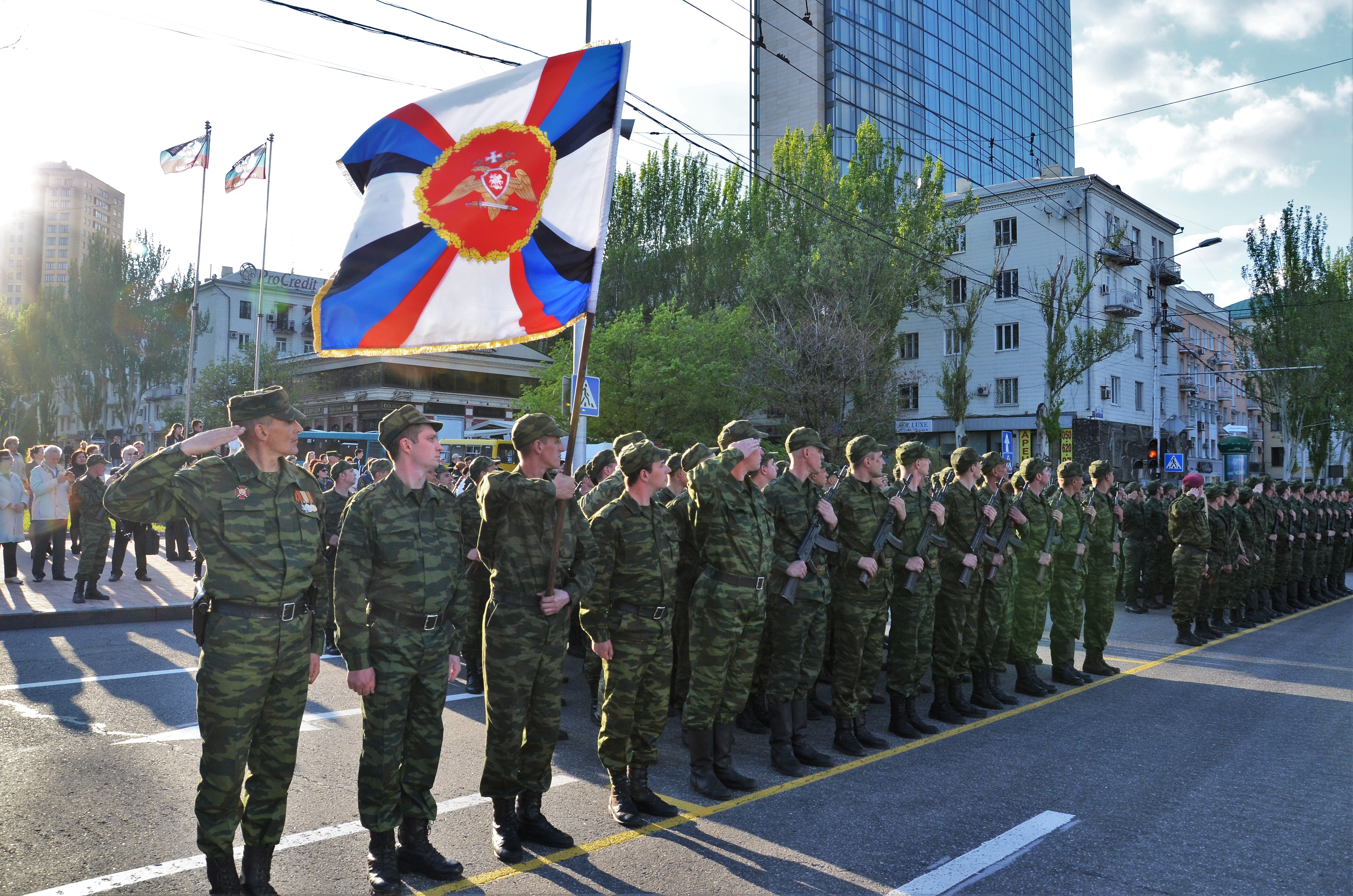 Репетиция парада в честь дня Победы в Донецке